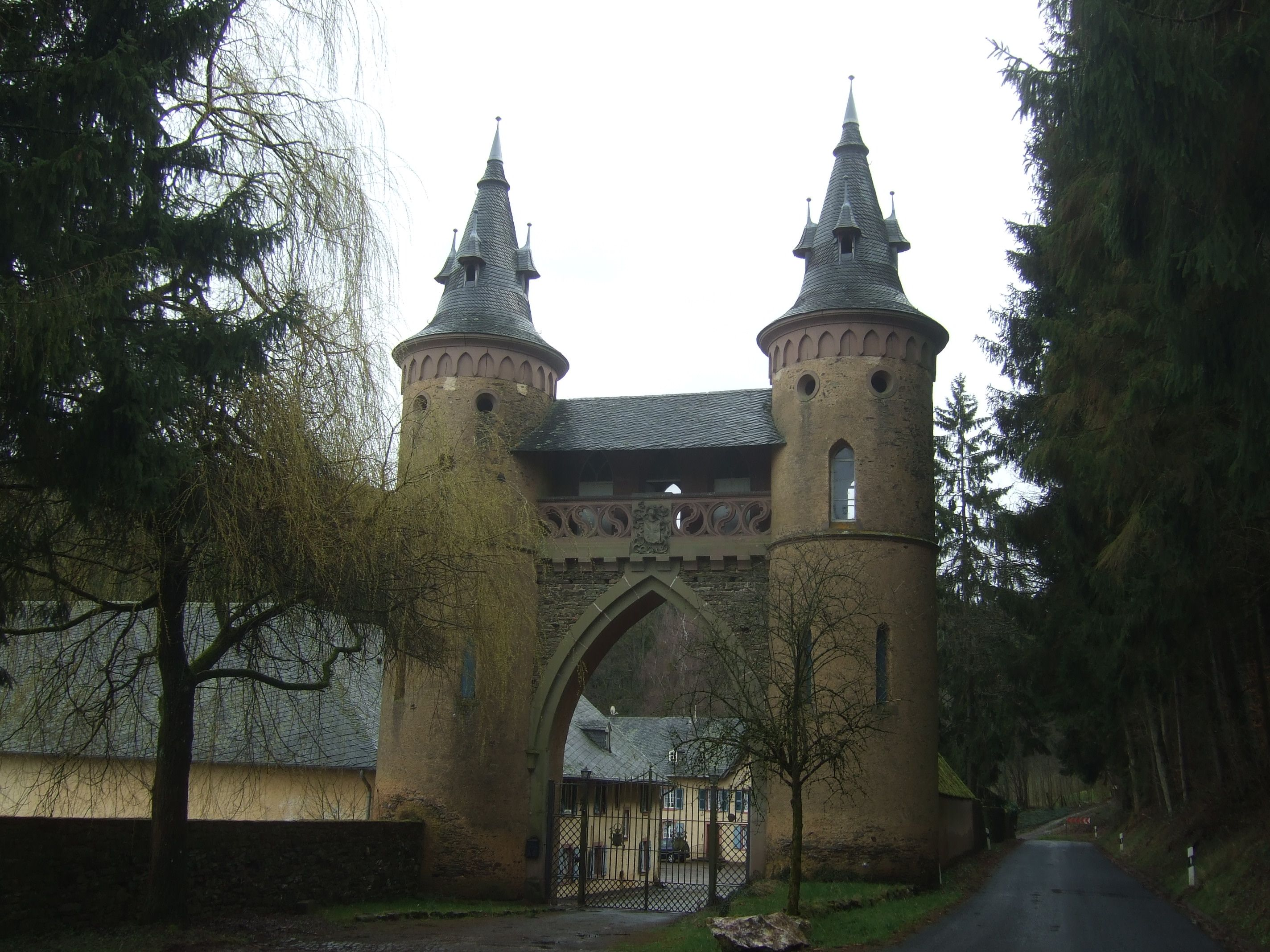 Burg Heid, Schillingen